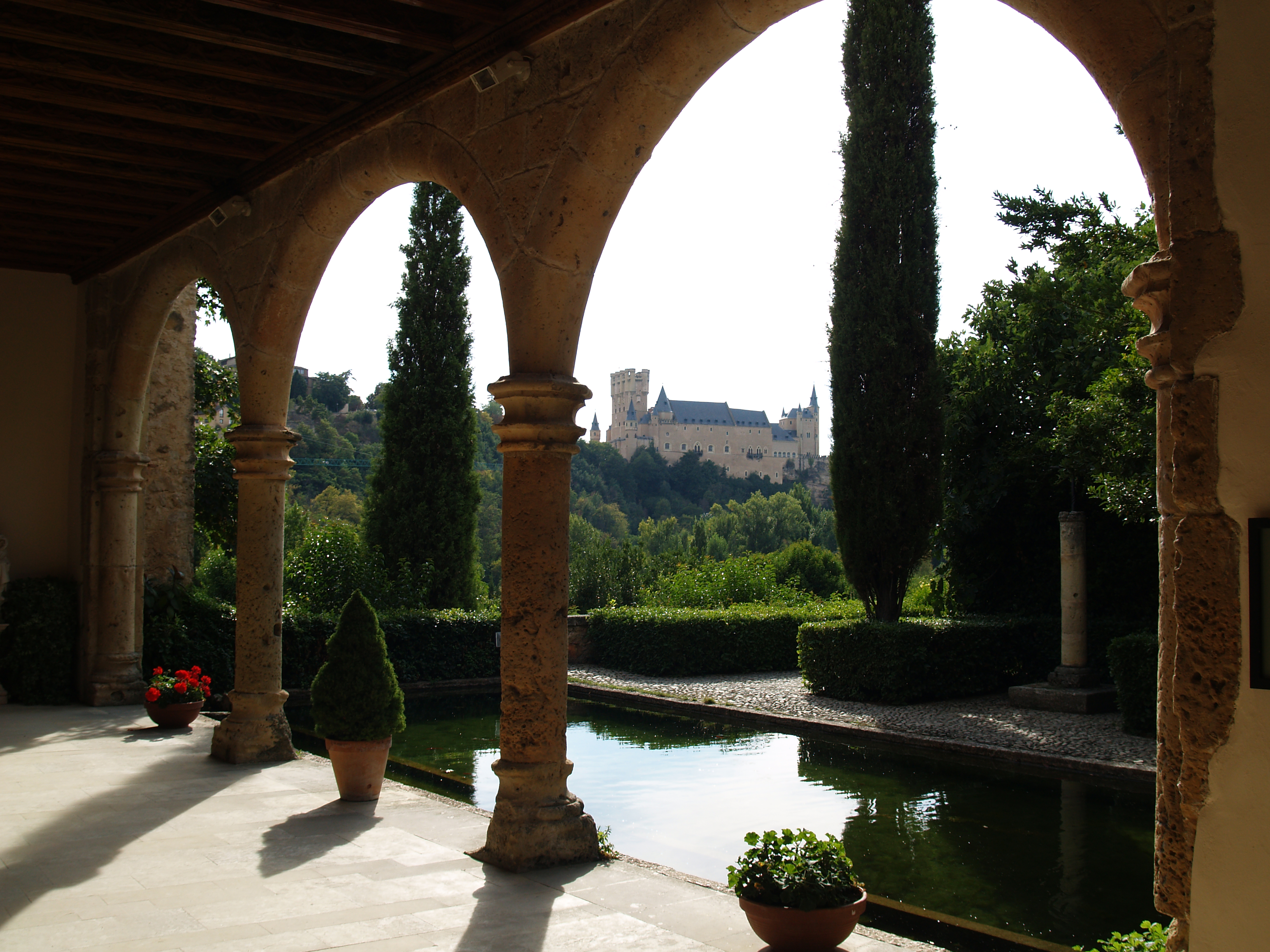 Segovia, Monasterio de El Parral, al fondo el Alcázar de Segovia. Santa Maria del Parral LocationSegovia, SpainCoordinates40° 57′ 21.7″ N, 4° 07′ 35.7″ W Established1447Authority control : Q1997245 VIAF: 236123145 BIC: RI-51-0000129 GND: 4645668-5 BNE: XX104503 JCyL: 11914 institution QS:P195,Q1997245 Alcázar of Segovia (Inventory)Native nameAlcázar de SegoviaParent institutionOld Town of Segovia and its AqueductLocationSegovia , (Spain)Coordinates40° 57′ 09″ N, 4° 07′ 58″ W Established1122Web pagealcazardesegovia.comAuthority control : Q557337 VIAF: 237436374 ULAN: 500308864 BIC: RI-51-0000861 GND: 4443101-6 BNE: XX83953 institution QS:P195,Q557337